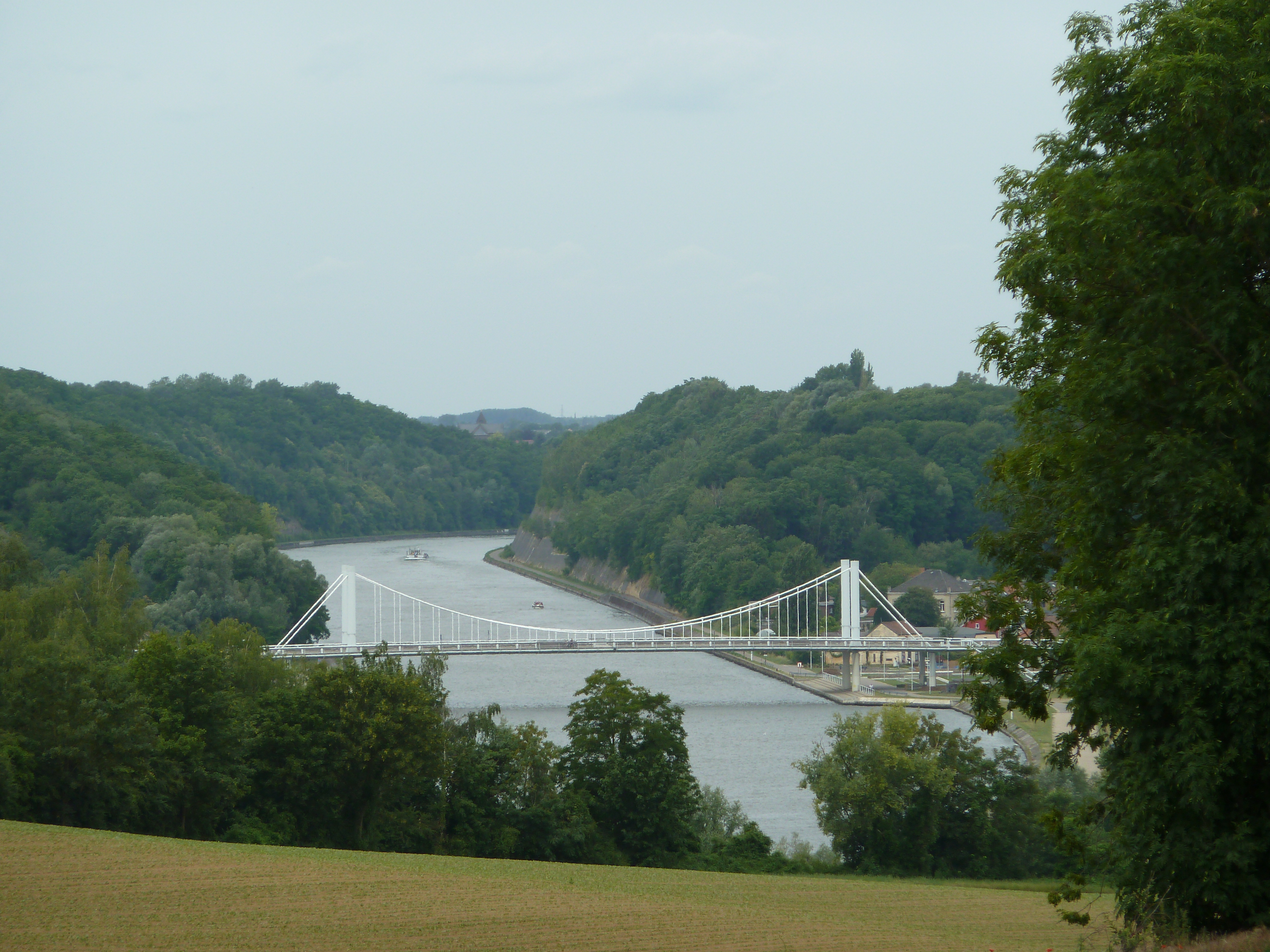 Albertkanaal ter hoogte van Kanne, gezien vanaf het plateau van Caestert, België